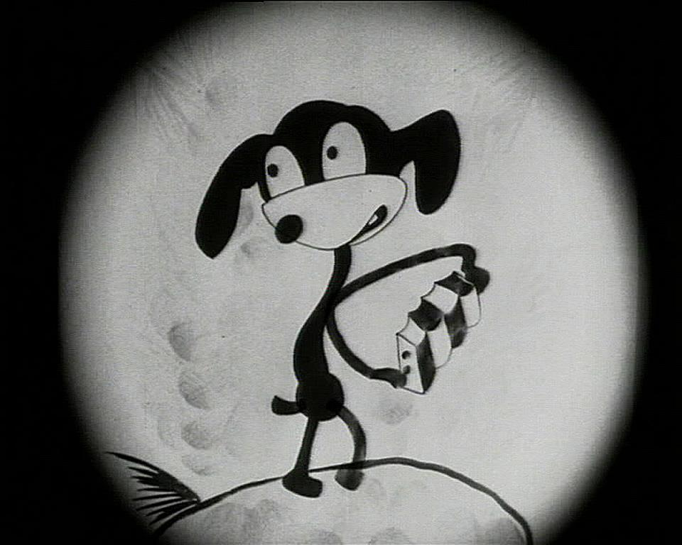 Kaader joonisfilmist "Kutsu-Juku"